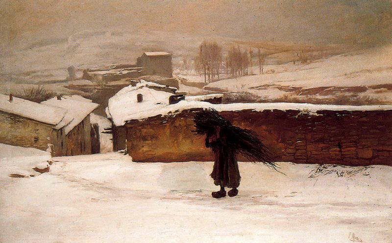 Jaime Morera Galicia Guadarrama